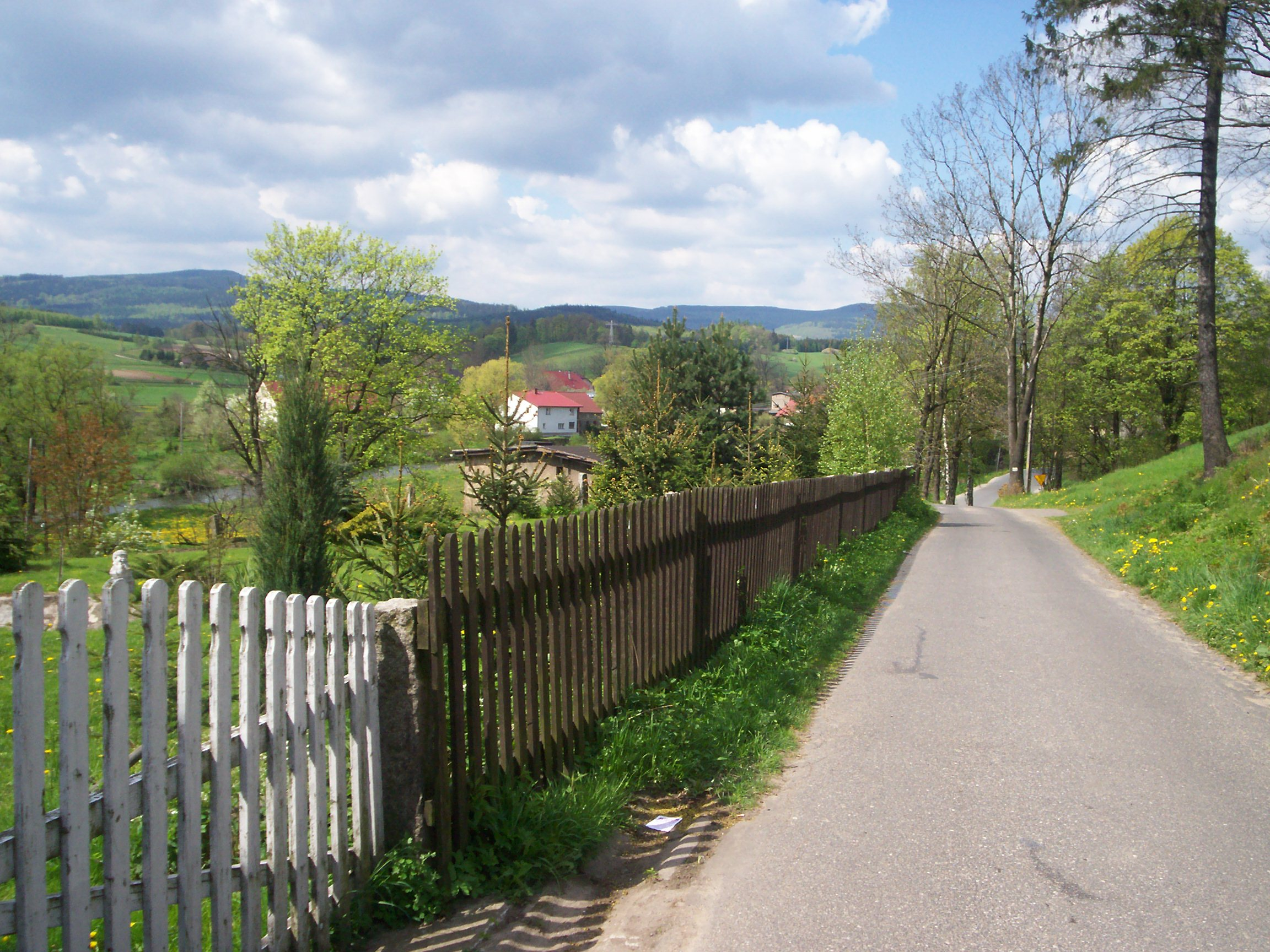 Marciszów.